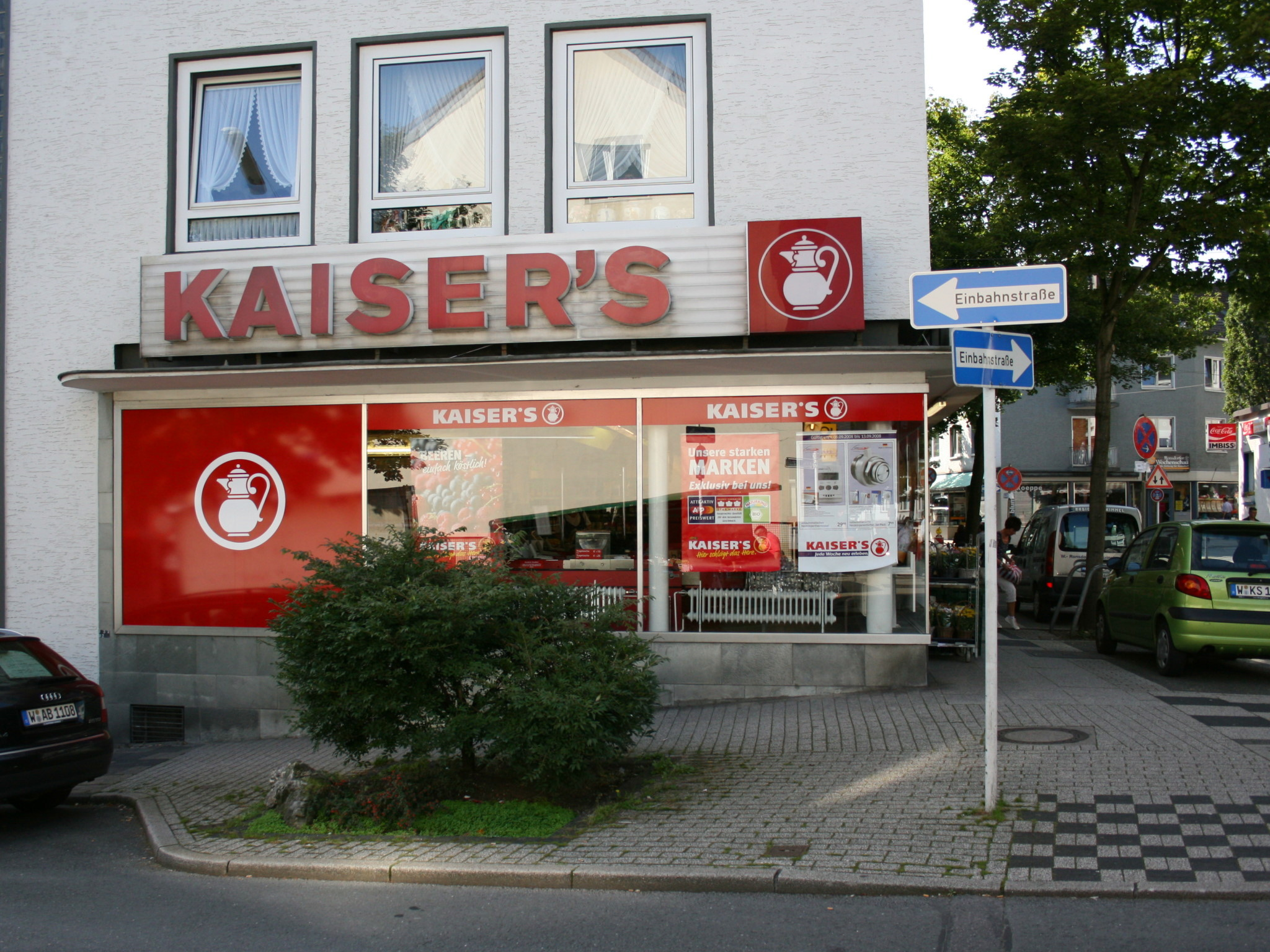 Wuppertal-Ronsdorf, Innenstadt